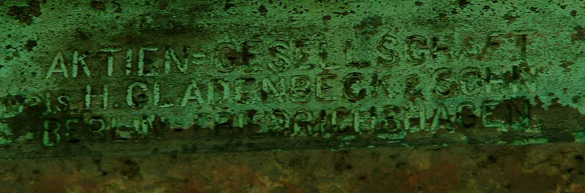 Sie haben ein besseres Bild? Sogar ein historisches Dokument als Bild(ungsförderung)? Zeigen Sie' s uns. Stiften Sie es Ihren Kindern, unseren Enkeln, allen Menschen. Hier.